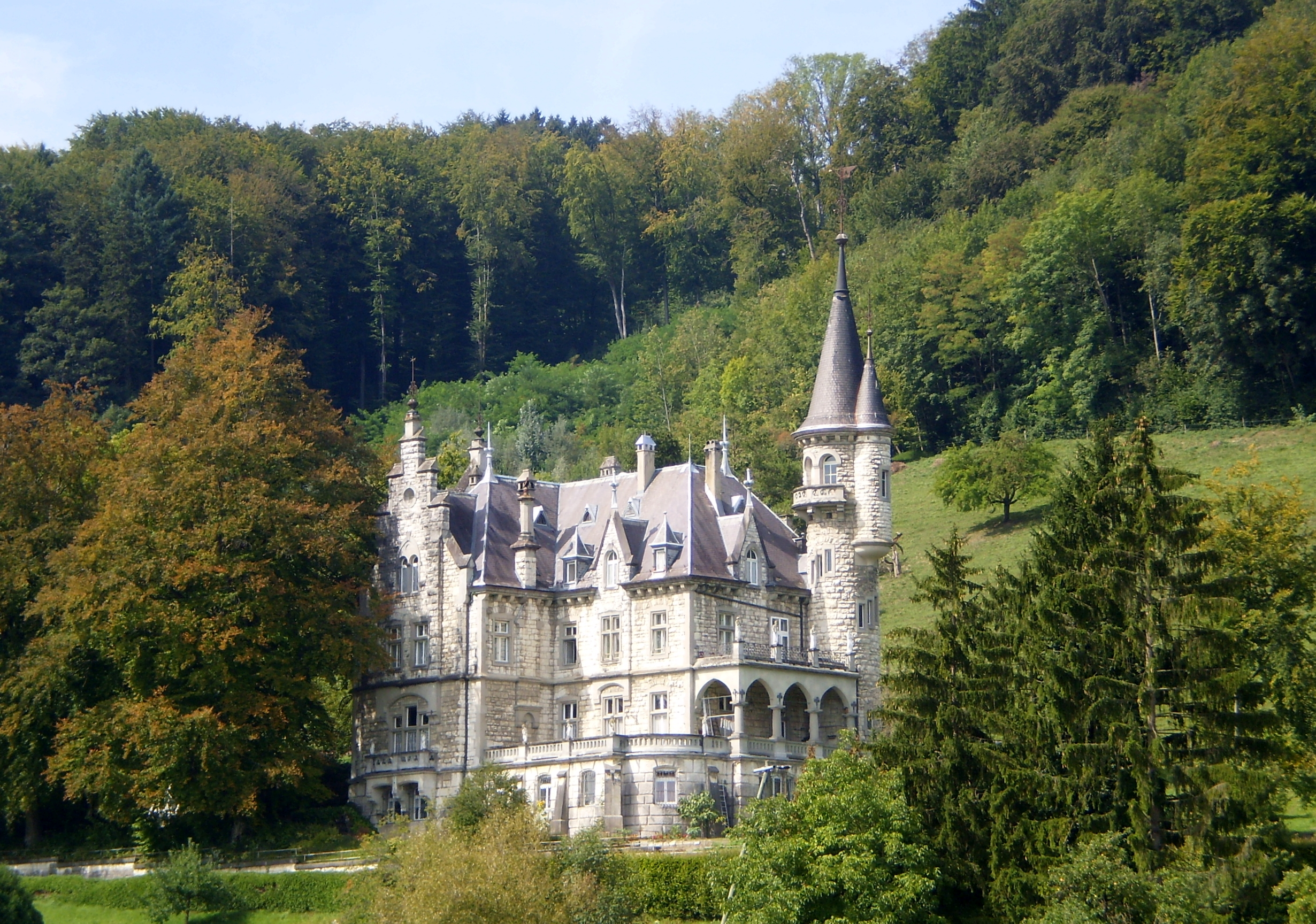 Schloss Wart bei Neftenbach, Kanton Zürich. In den Jahren 1889–91 im Neugotischen Stile anstelle einer alten Burg der Freien von Wart erbaut.